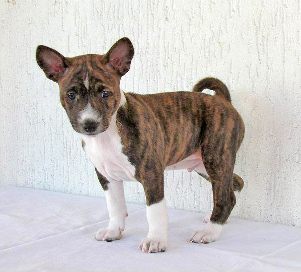 Basenji puppy